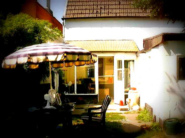 Lomografie-effect met Picasa